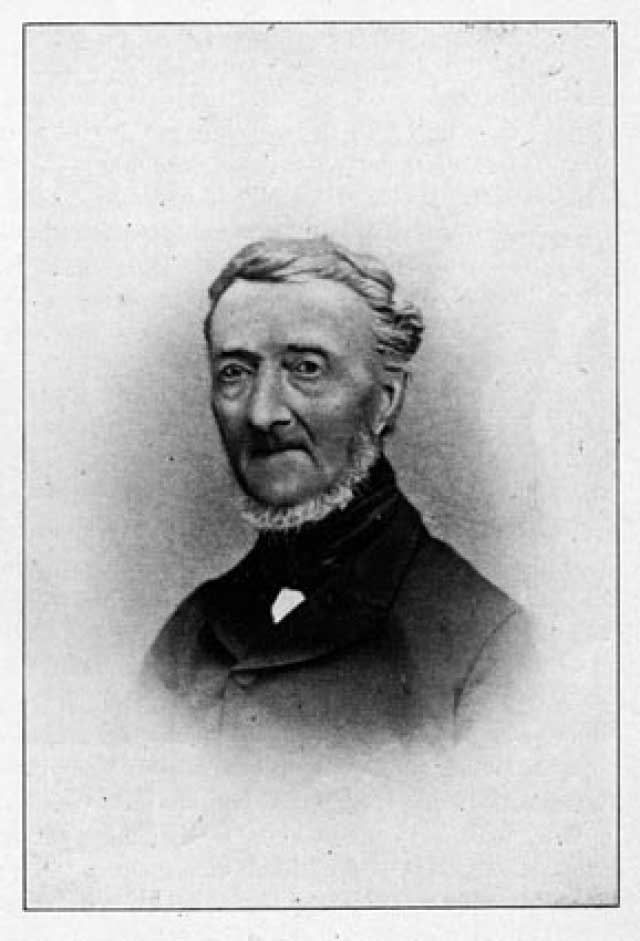 Synco Reijnders voor 1873